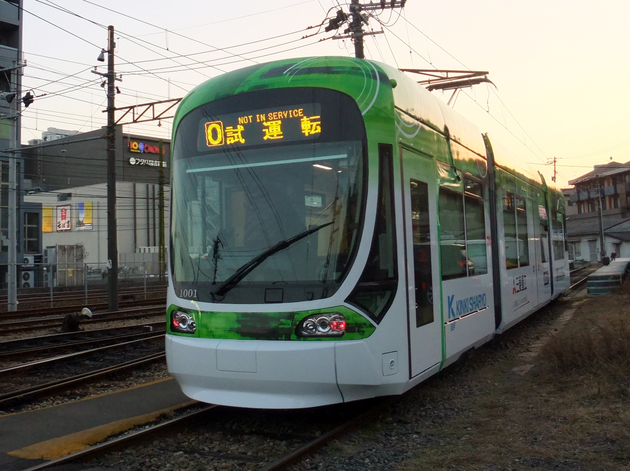 広電1000形電車（2代目）（撮影許可を得て撮影）